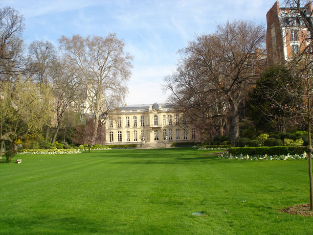 Le parc de l'Hôtel de Matignon